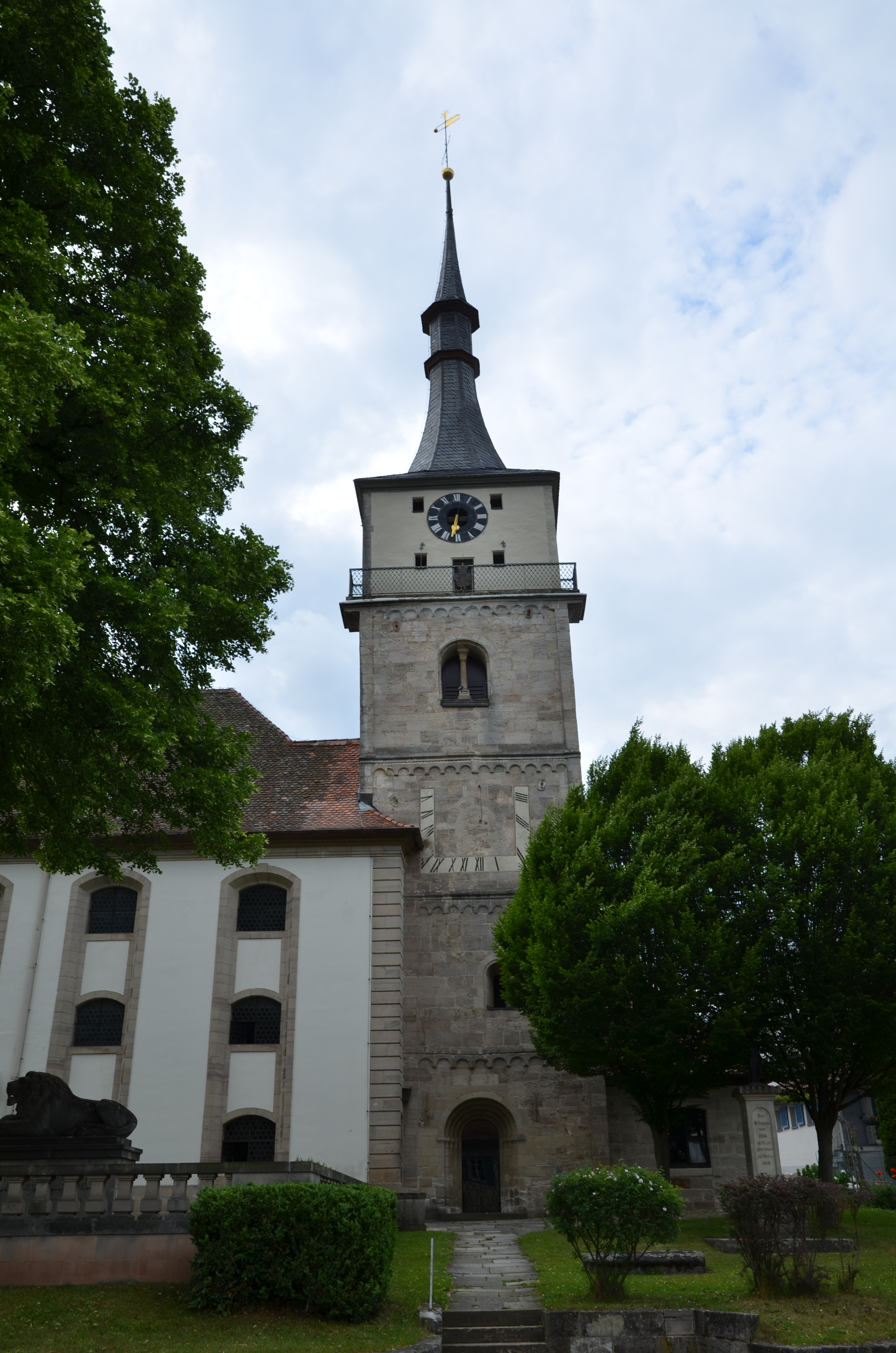 evang.-luth. Kirche St. Kilian in Emskirchen